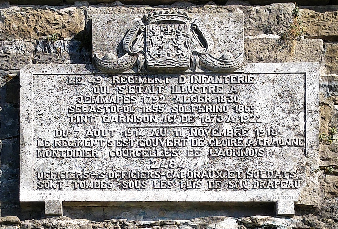 Plaque à la mémoire du 49e régiment d'infanterie au Château Neuf à Bayonne